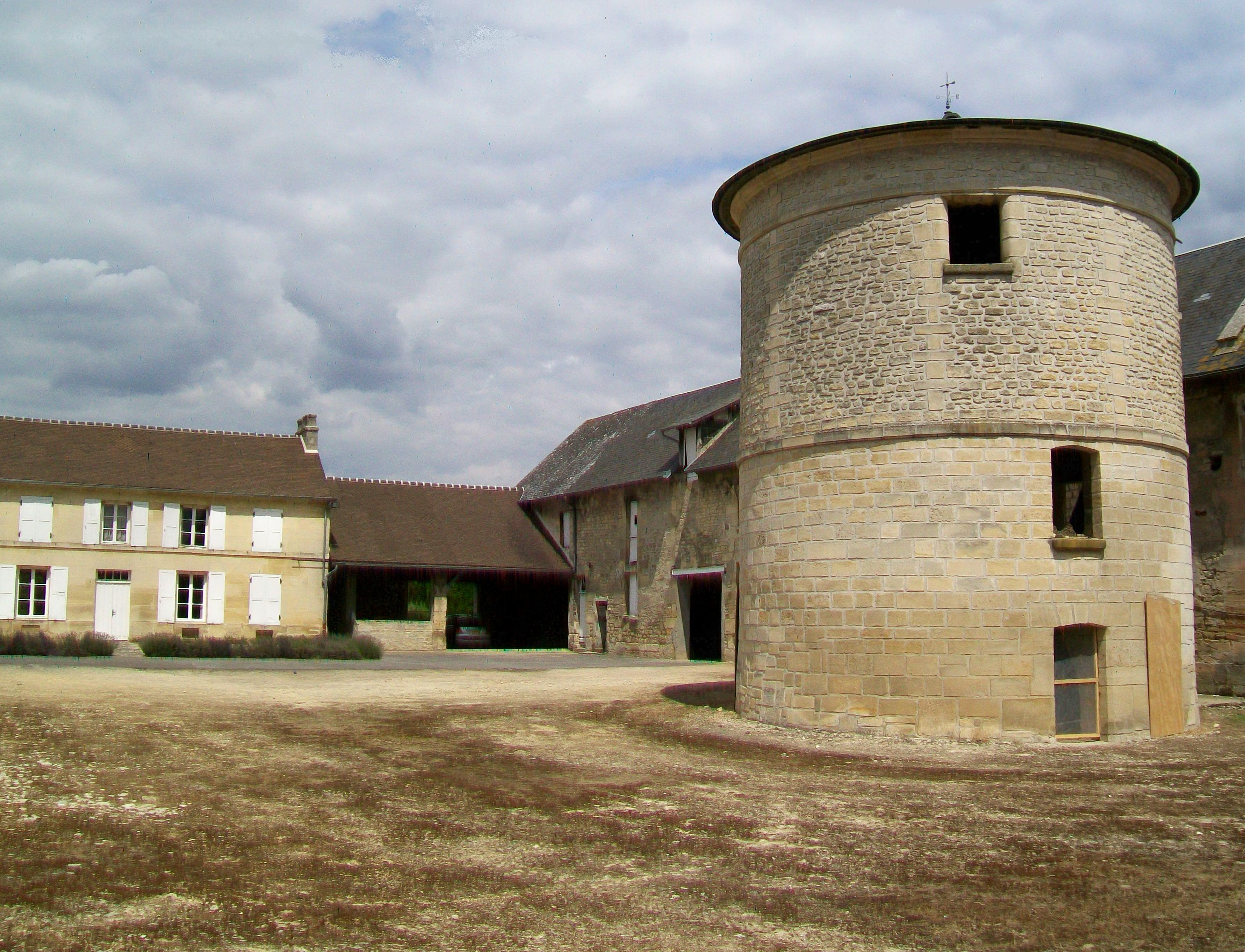 La grande ferme (désaffectée) avec son colombier, au nord du château.